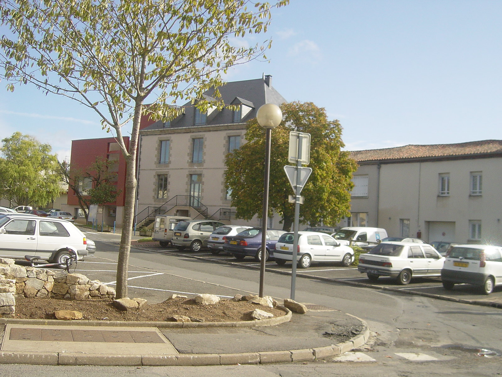 Nueil les Aubiers Centre Socio-Culturel (Deux-Sèvres - 79) Monument